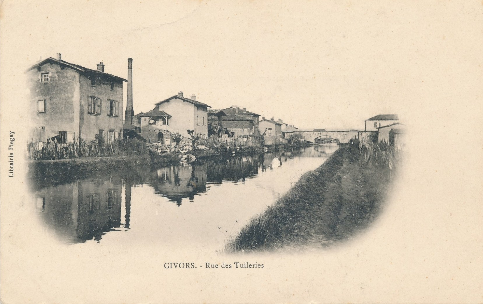 Le Canal de Givors, env. 1900. Archives municipales de Givors, 5Fi 1445